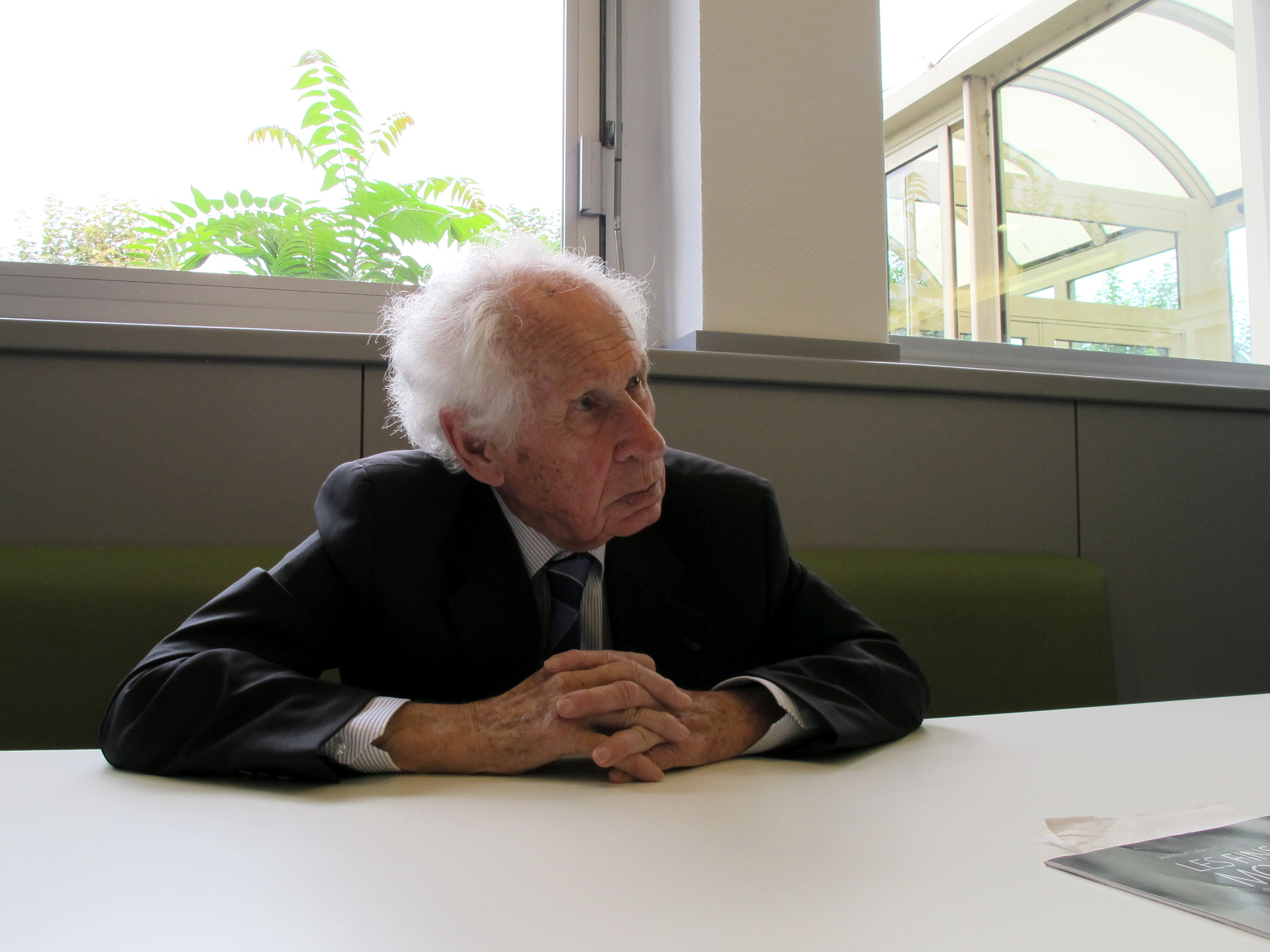 André Lafargue en 2012, dans le restaurant d'entreprise du Journal Le Parisien.